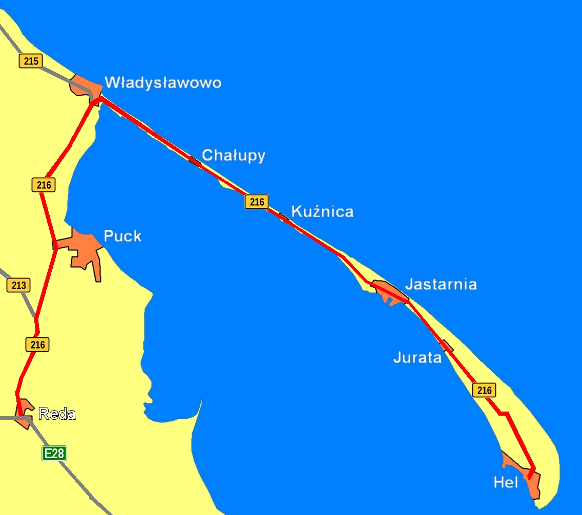 droga wojewódzka 216 (Poland)